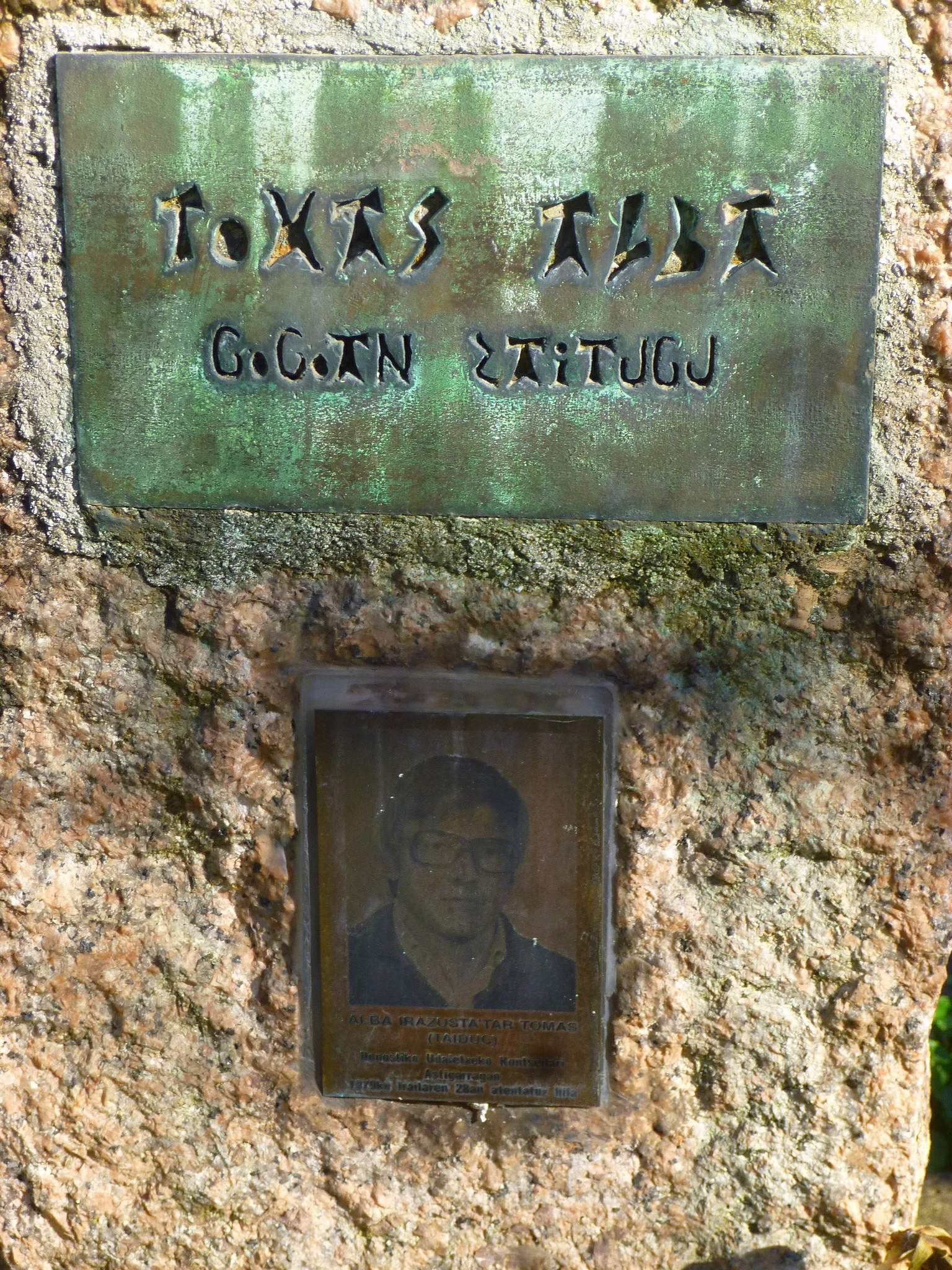 Astigarraga - Memorial de Tomás Alba Irazusta